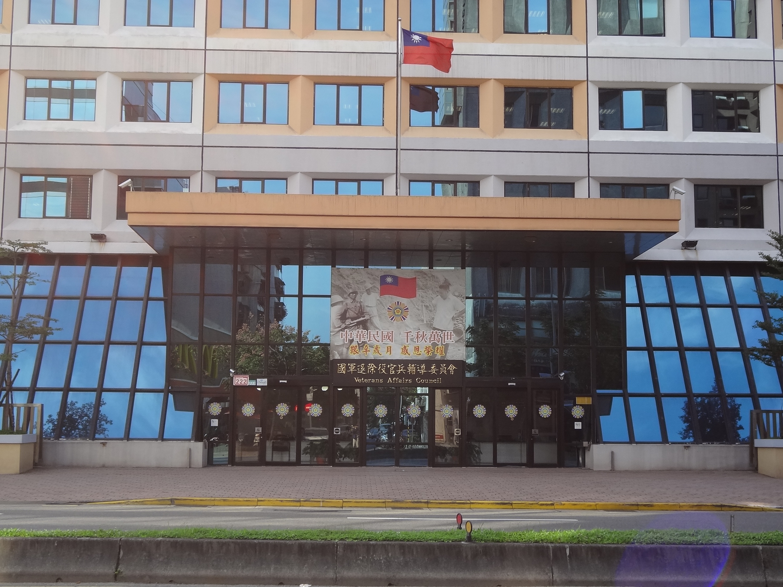 中華民國國軍退除役官兵輔導委員會大樓大門。